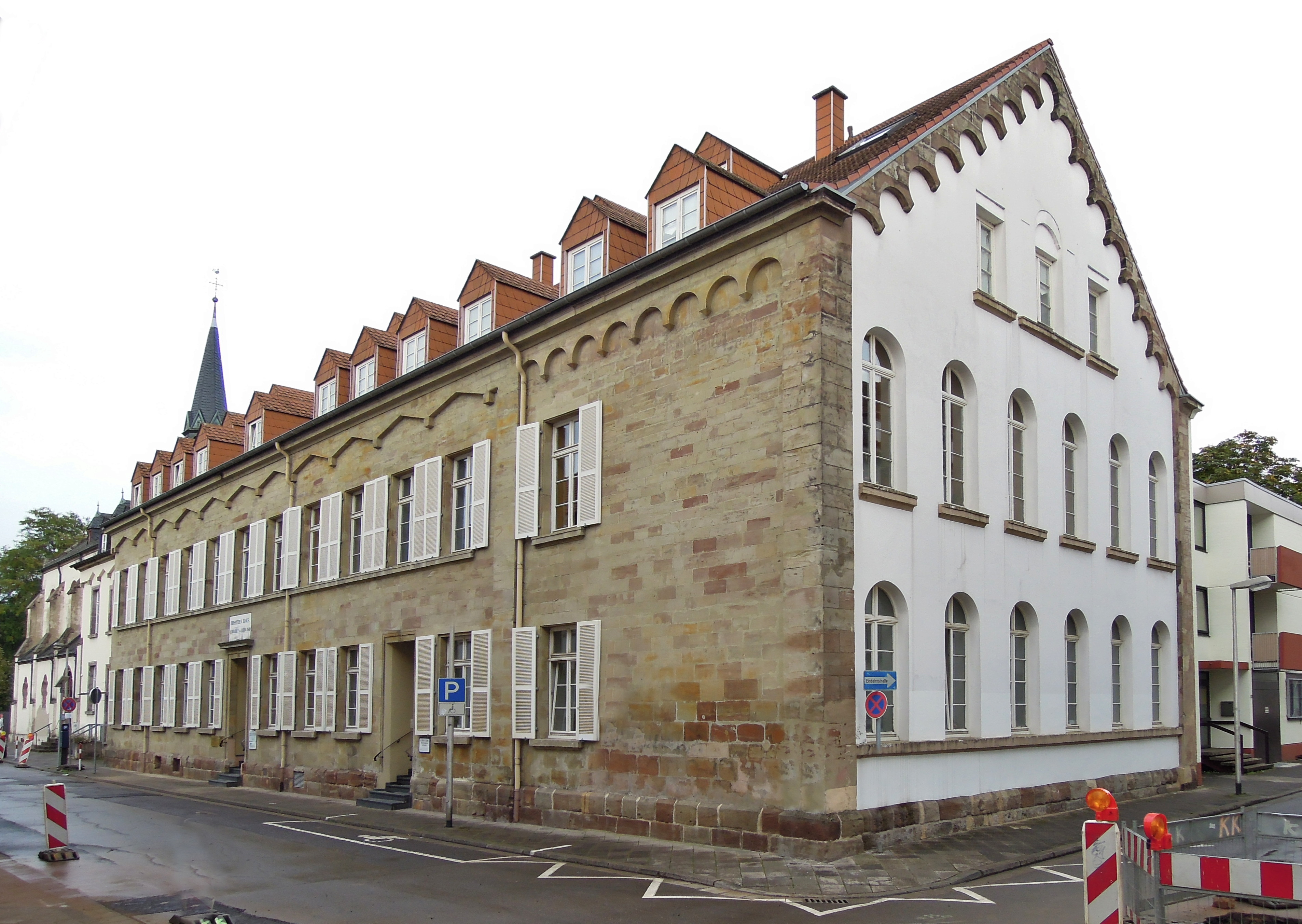 Stiftstraße 14-18, Canisianum, Hospital, 1840-41 von Johann Claudius von Lassaulx (Einzeldenkmal)